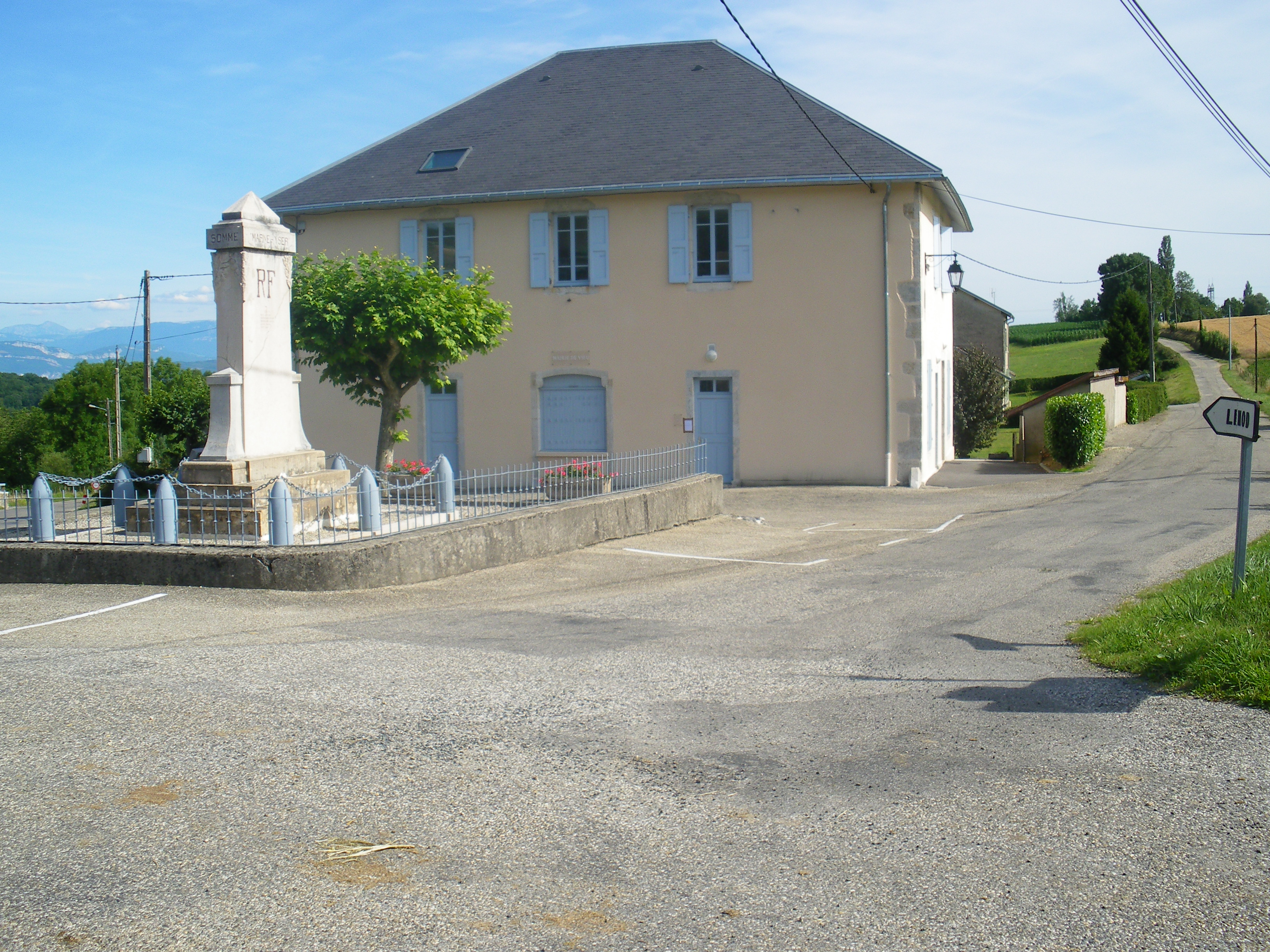 Mairie de Vieu